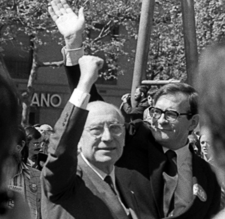 Enrique Tierno Galván y Ramón Tamames asisten a la manifestación del 1º de Mayo, de 1979, en Madrid.